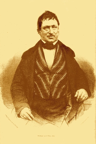 Portret van Jan Fresemann Viëtor (1784-1852)